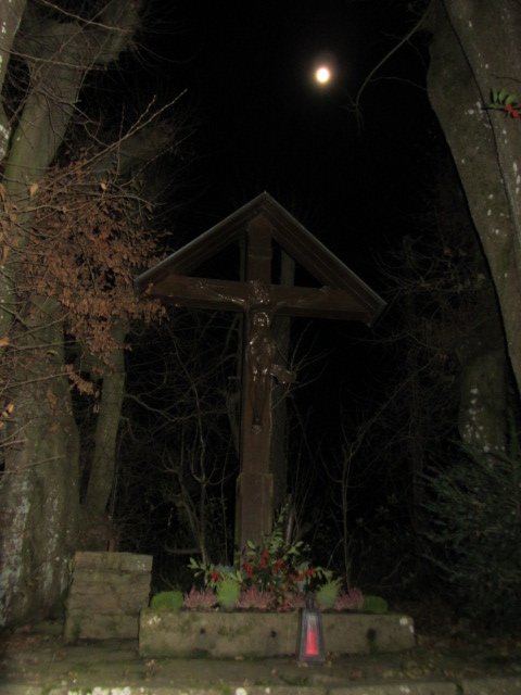 Deitsch: Dorfplatz "Dicke Nuss"